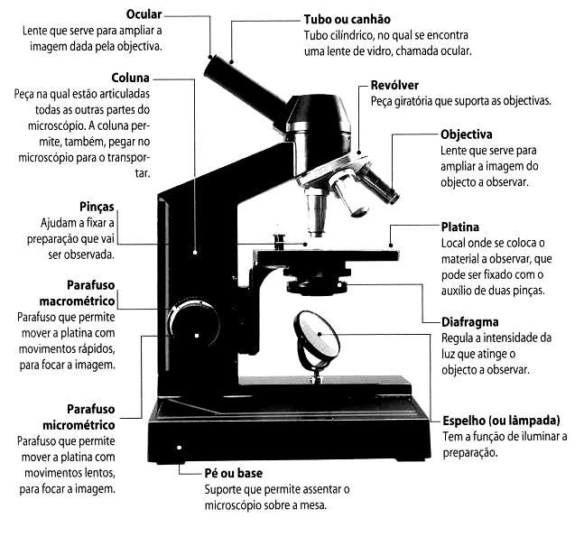 Detalhamento das partes de um microscópio óptico.